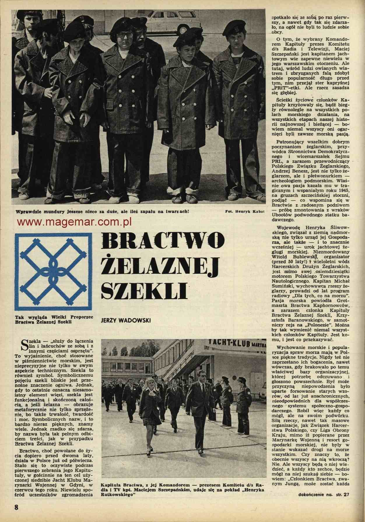 Strona 8 z miesięcznika "Morze", Rocznik 1975 Numer 8 (537)